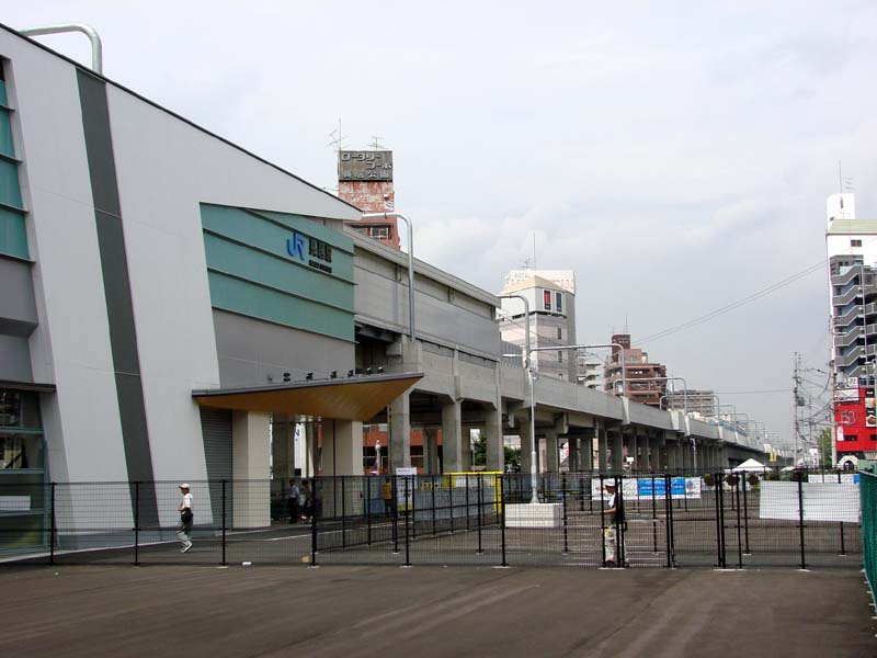 高架化された阪和線 美章園～杉本町間（長居駅付近）